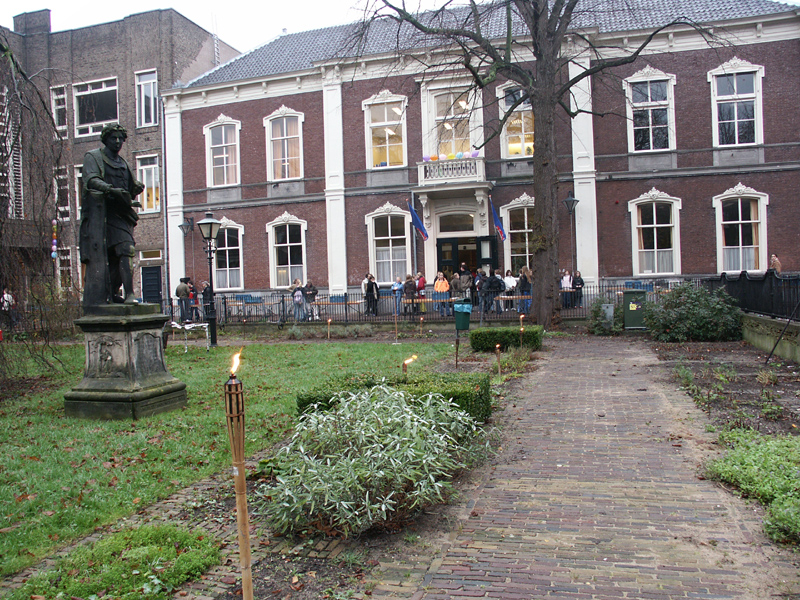 Het Stedelijk Gymnasium te Haarlem, tijdens de lustrumviering op 6 december 2004